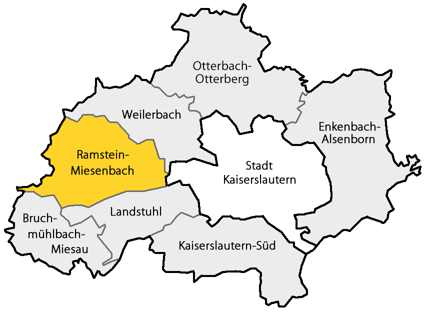 Karte der Verbandsgemeinde Ramstein-Miesenbach im Landkreis Kaiserslautern